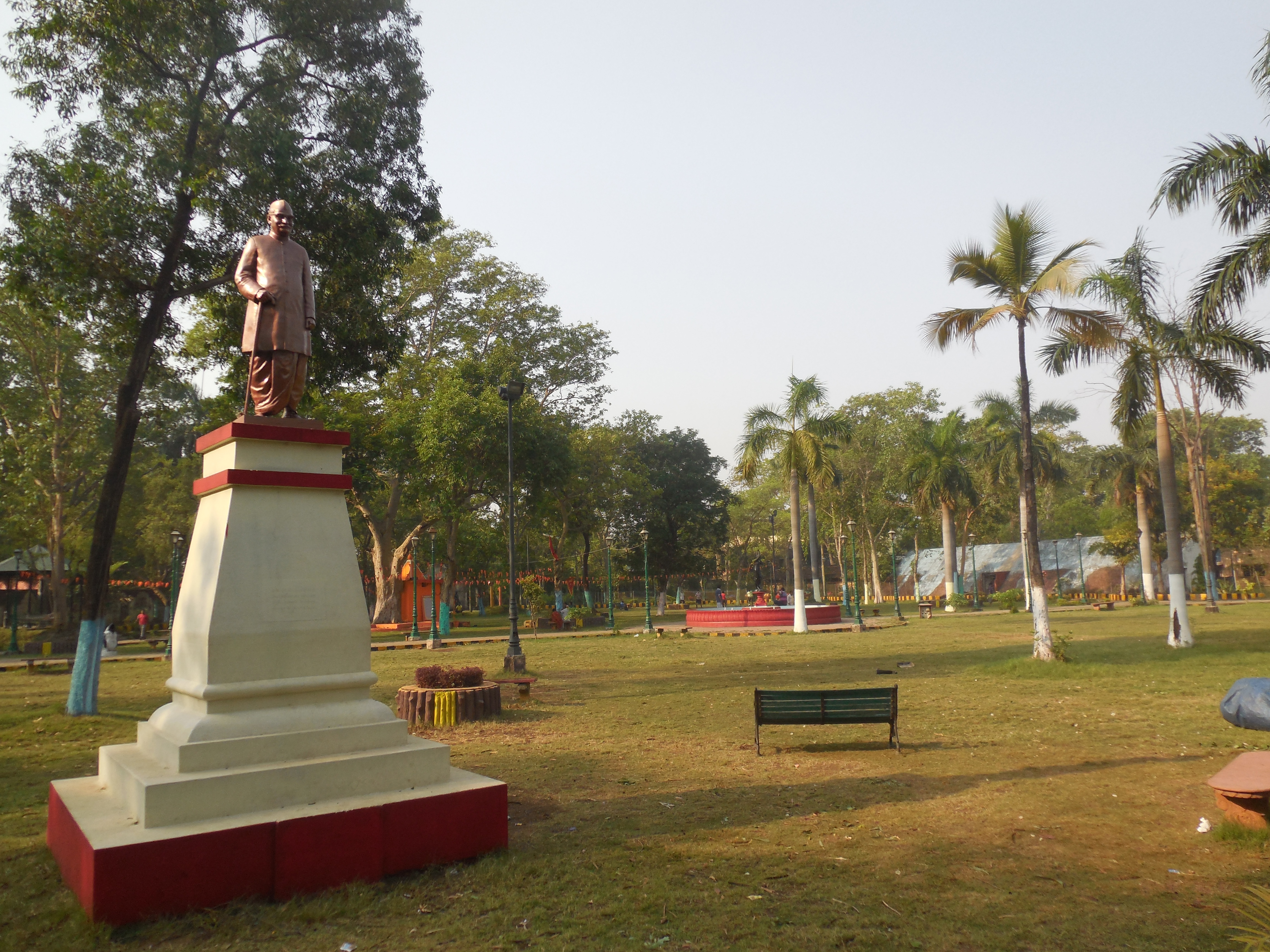 राजेंद्र पार्क, दुर्ग